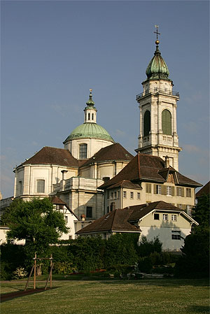 Solothurn: St. Ursen-Kathedrale